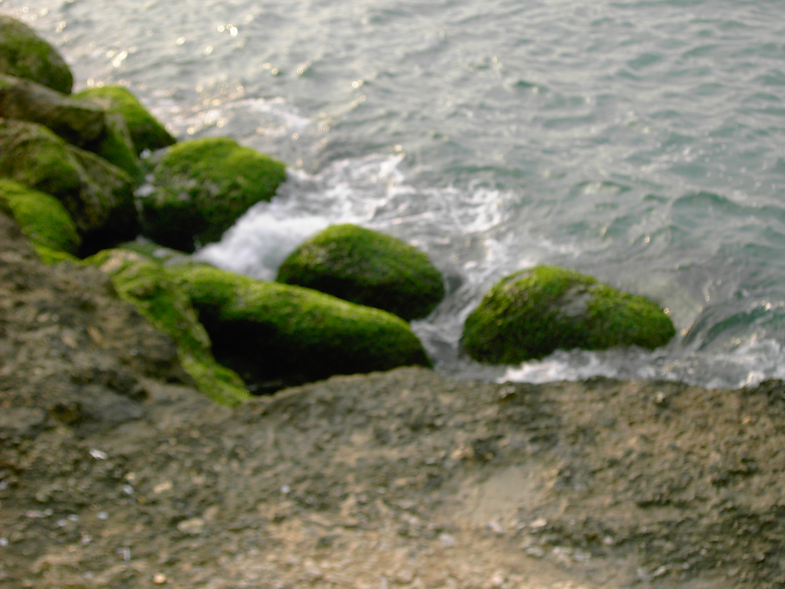 Photo personnelle d'Alexandrie